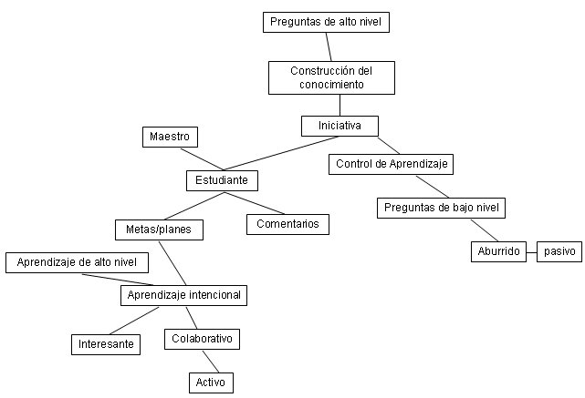 Red Pathfinder sobre el aprendizaje intencional